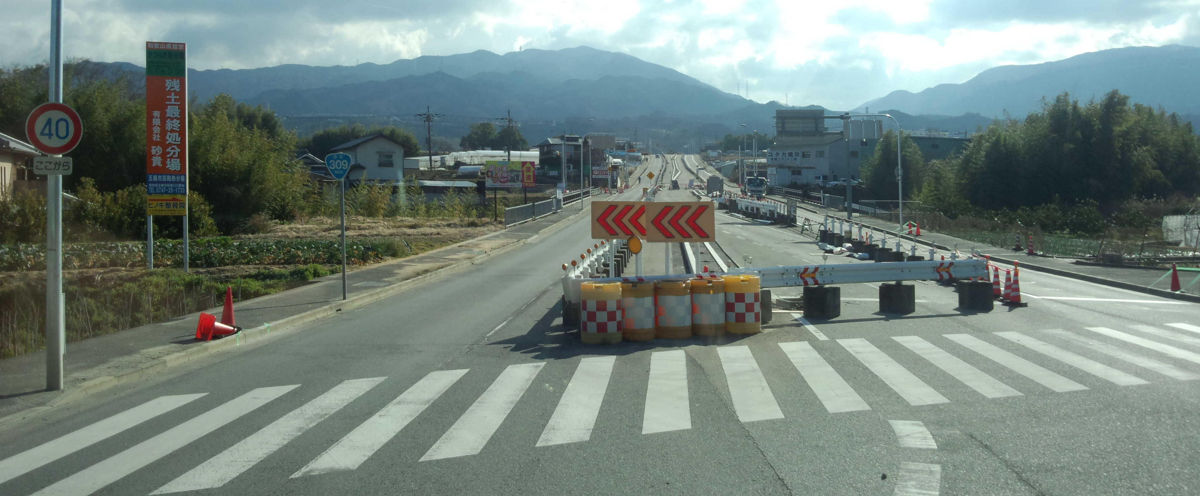 R309の河南赤阪BP